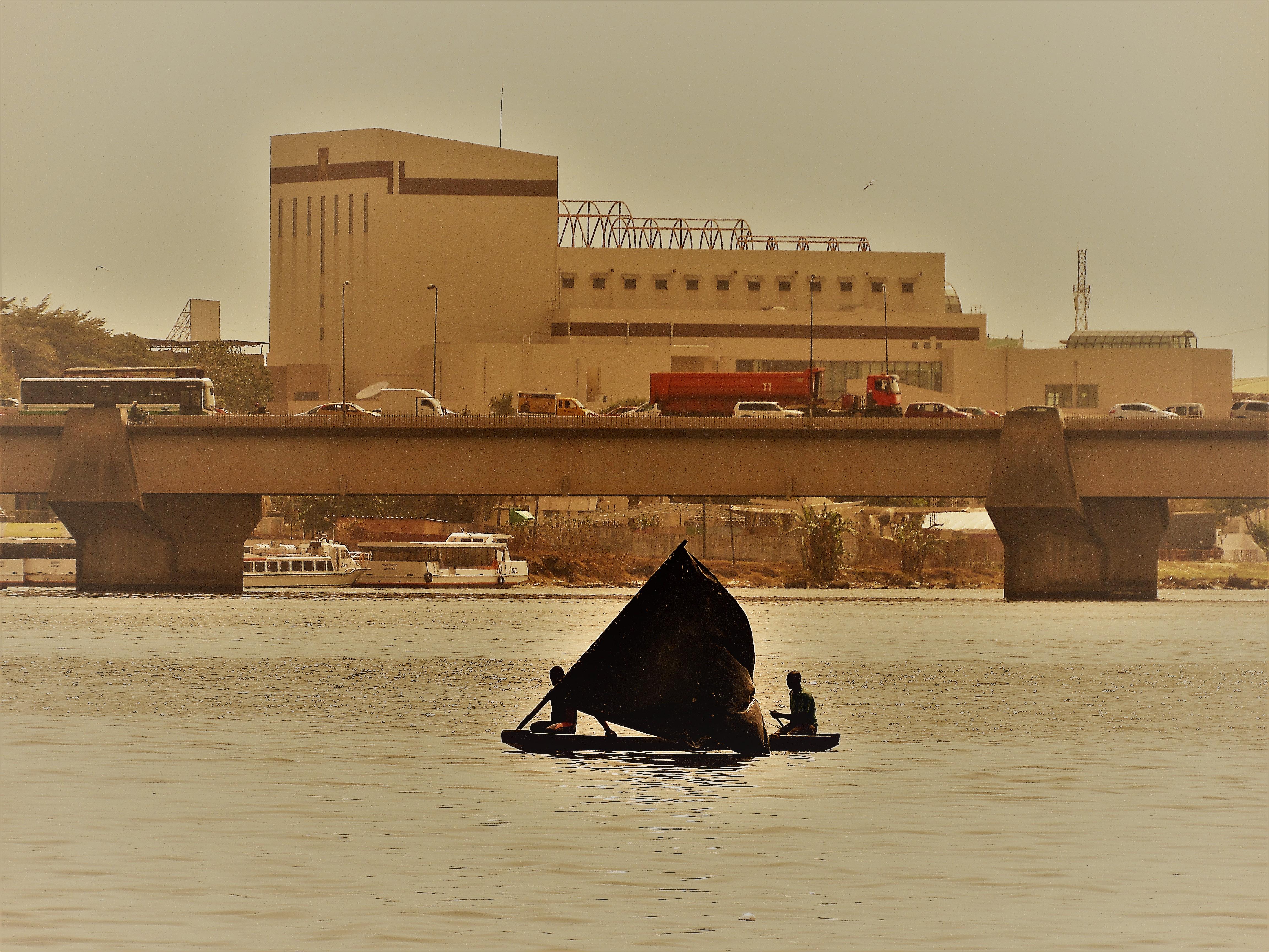 pirogue à voile en plastique sur la lagune ébrié dans le village de blokosse This is an image with the theme "Africa on the Move or Transport" from: Ivory Coast